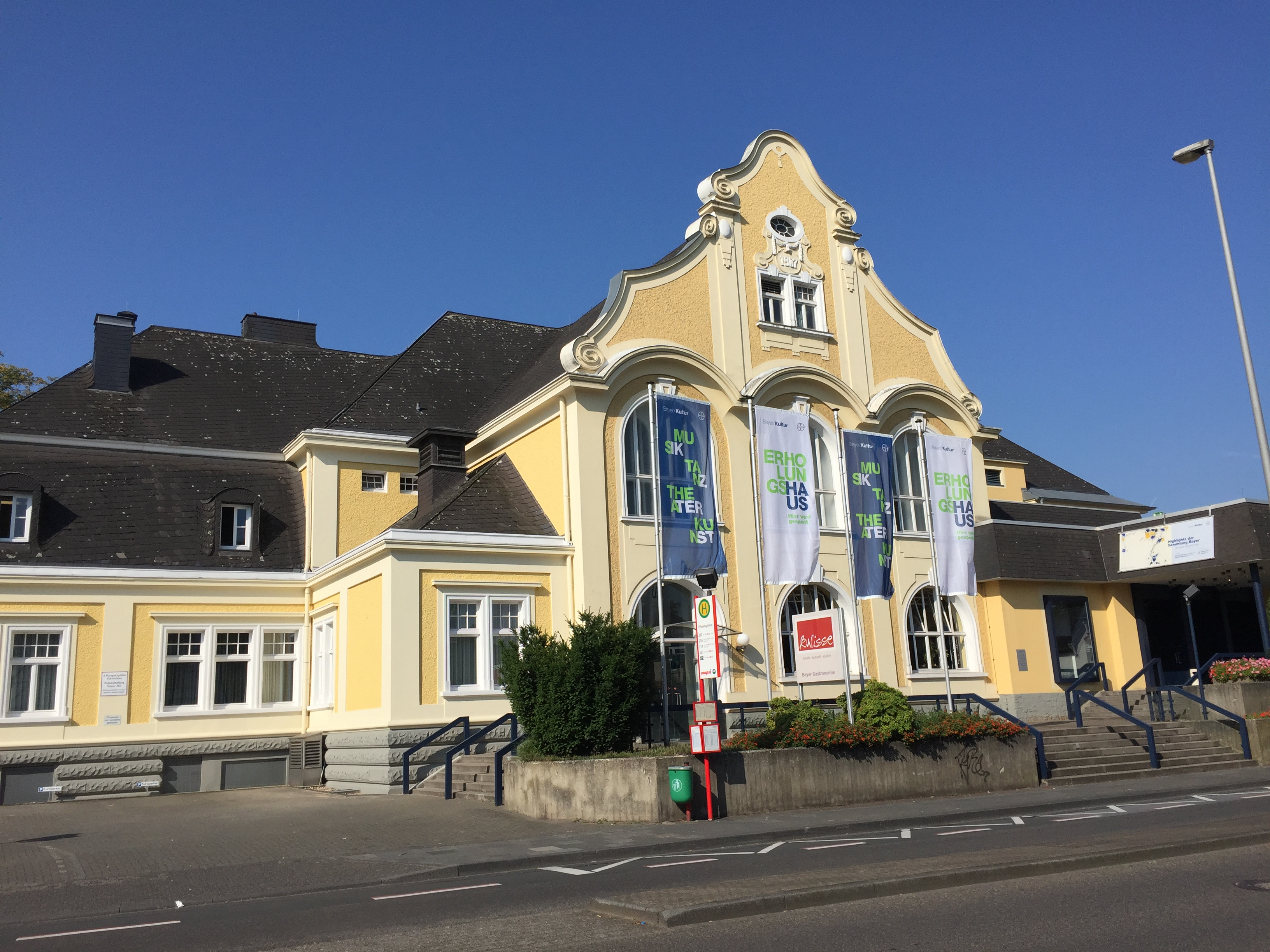 Erholungshaus